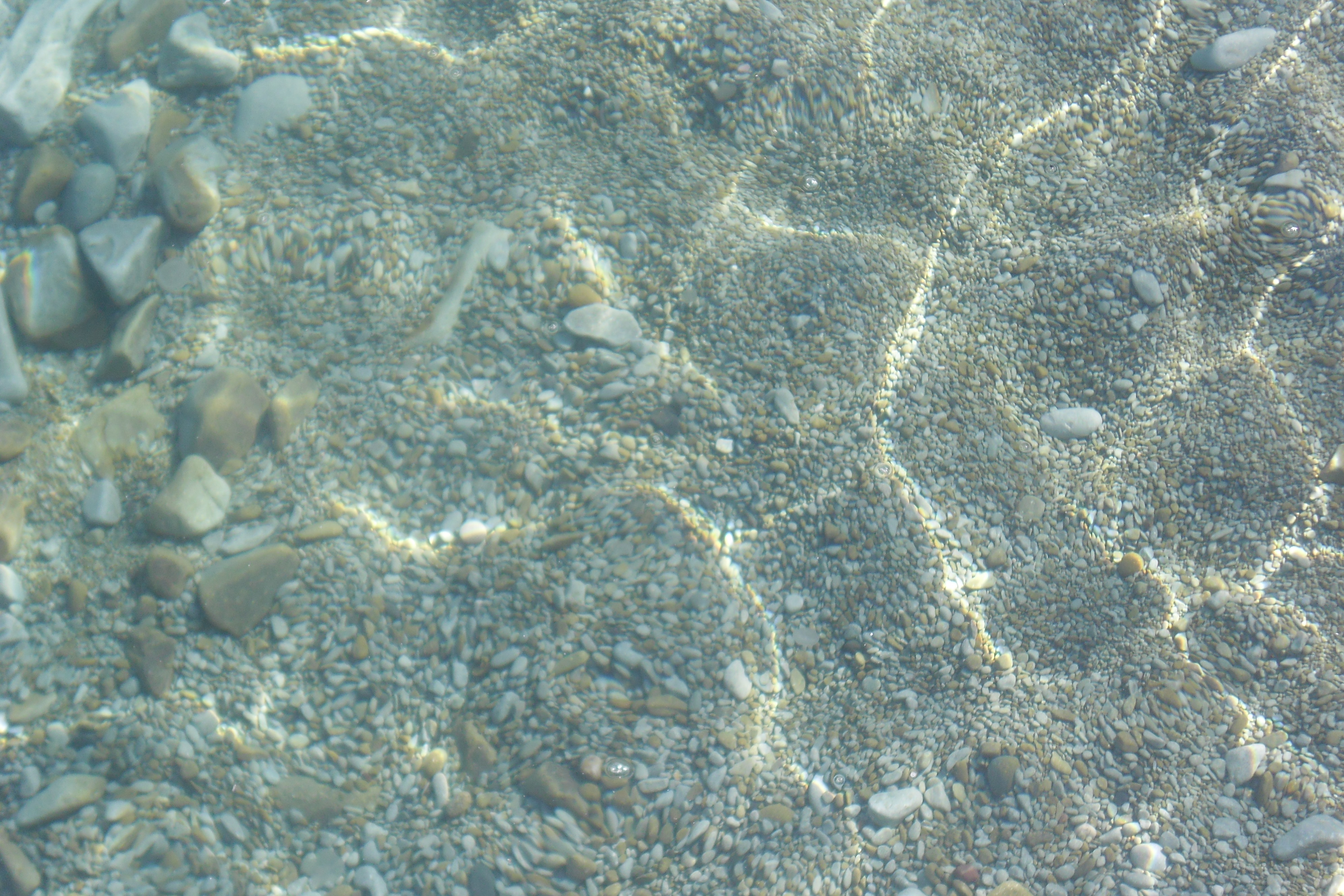 Відблиски